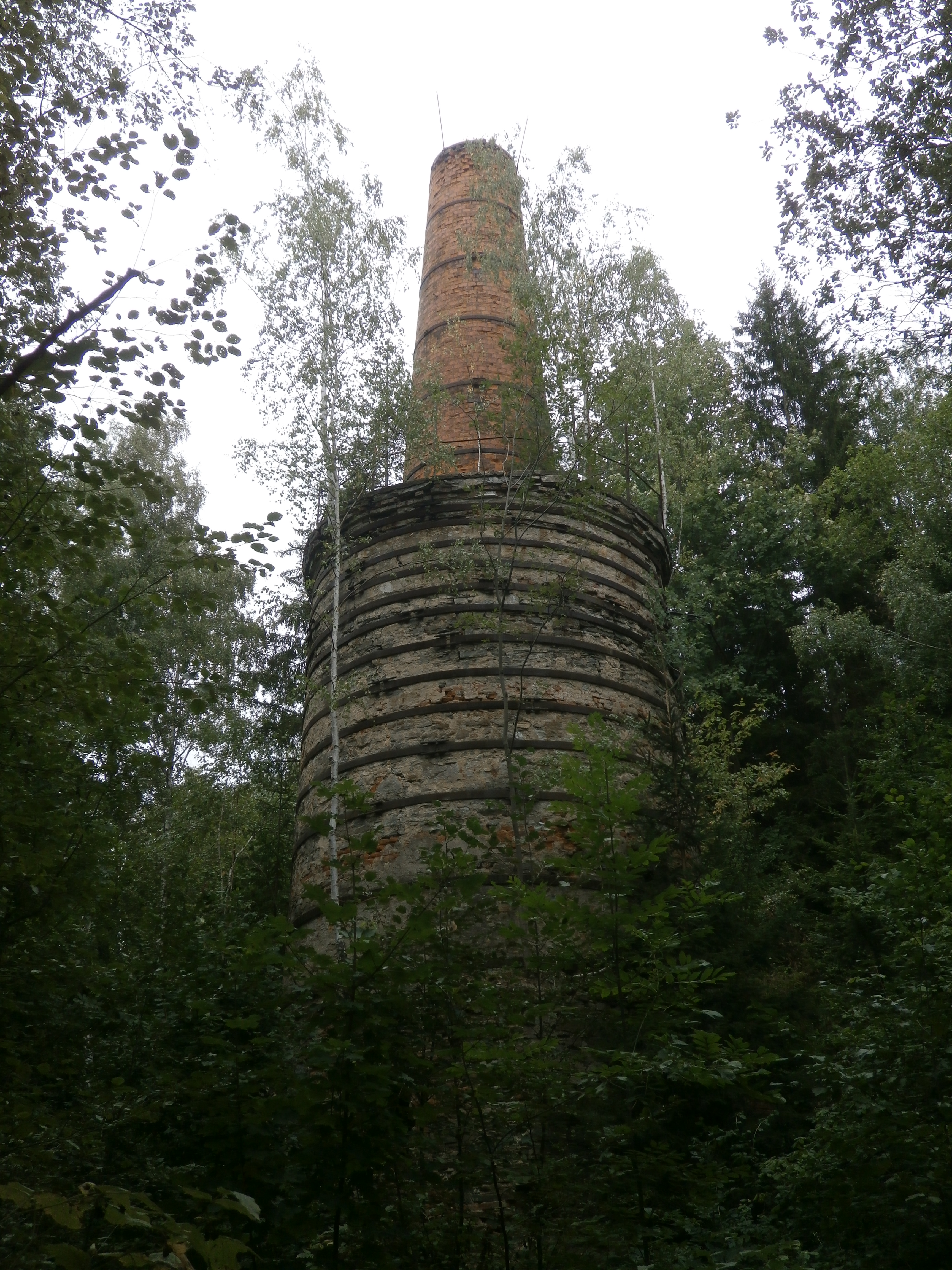 Trhonice - bývalá vápenka